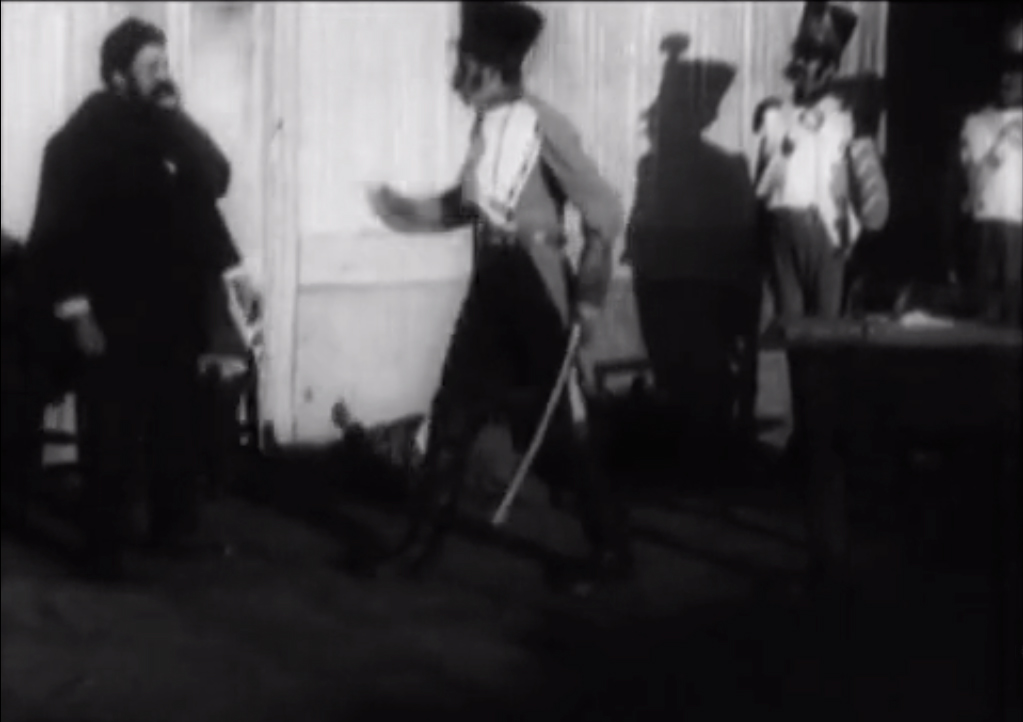 Fotograma de "Manuel Rodríguez" (1910), cortometraje de 20 minutos dirigido por Adolfo Urzúa Rosas. Formato 35 mm, b/n, mudo. Considerada la primera película argumental del cine chileno.